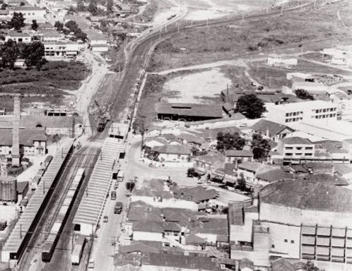 Vista aerea Osasco 1961